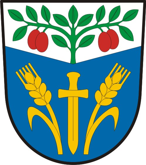 Dřínov